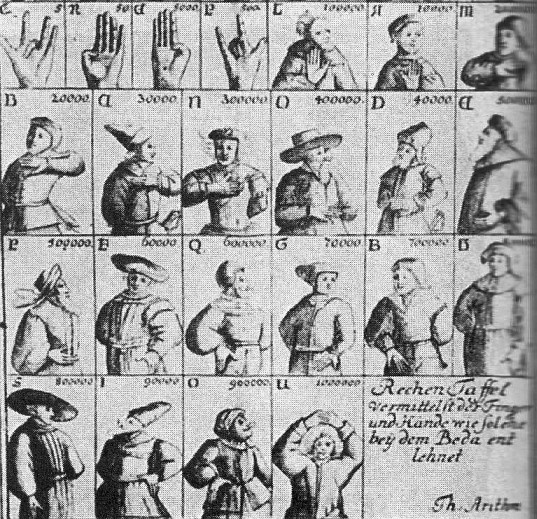 finger from the book from "Arifmmetichesko geometric theater" Jacob Leopold (large numbers) / Пальцевый счёт Беды из книги "Арифмметическо-геометрический театр" Якоба Леопольда (крупные числа)